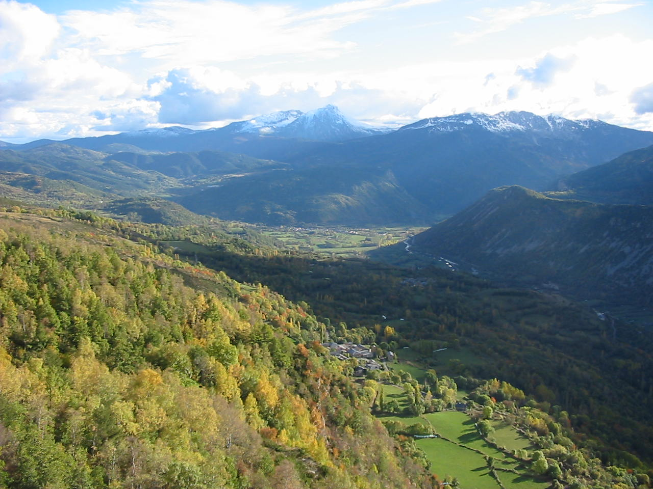 Vista del massís del Turbó, des de la vall de Benasc. Eresué en primer terme, Castilló de Sos al fons.